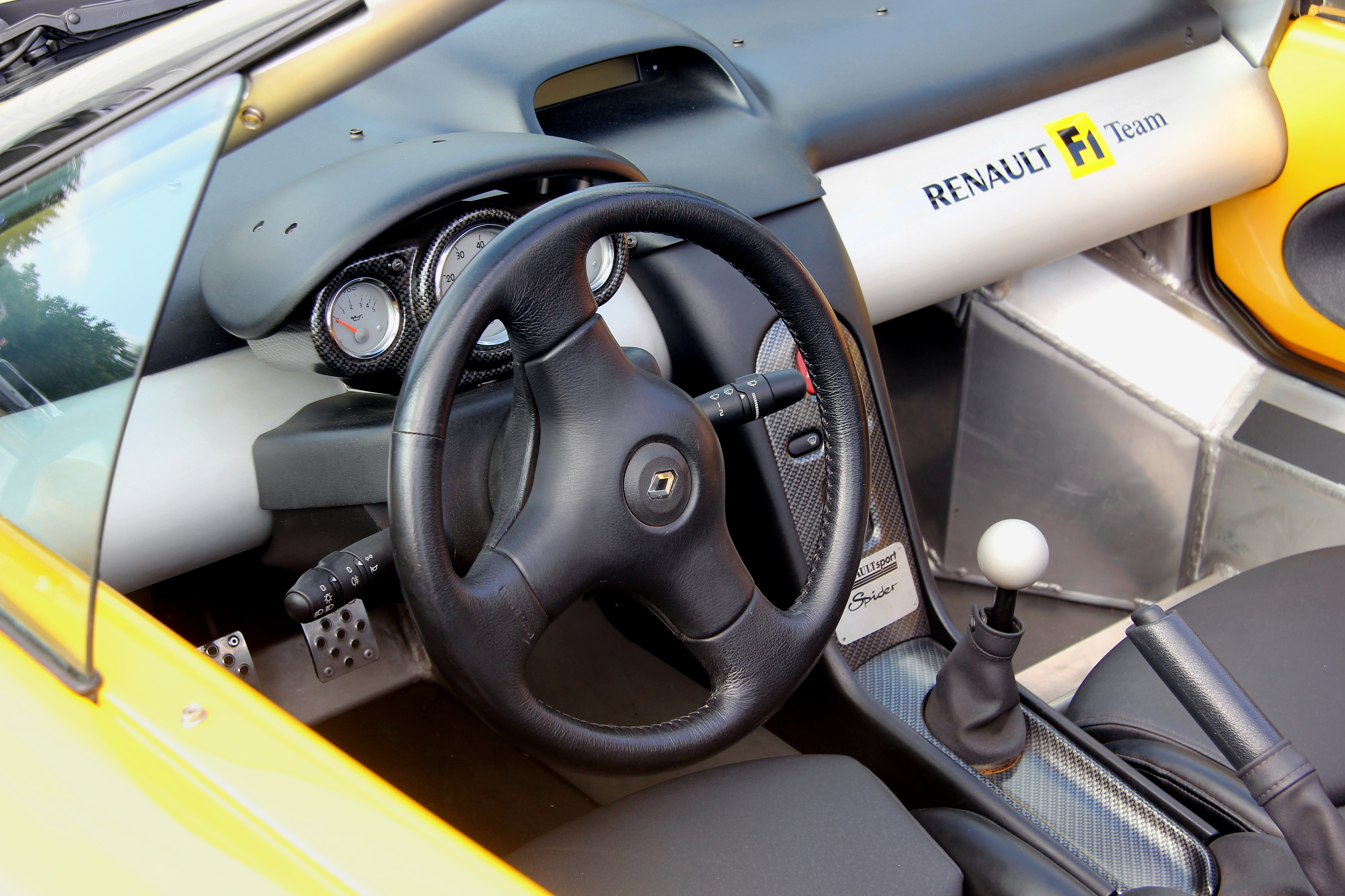 Renault Sport Spider, gebaut von 1995 bis 1999